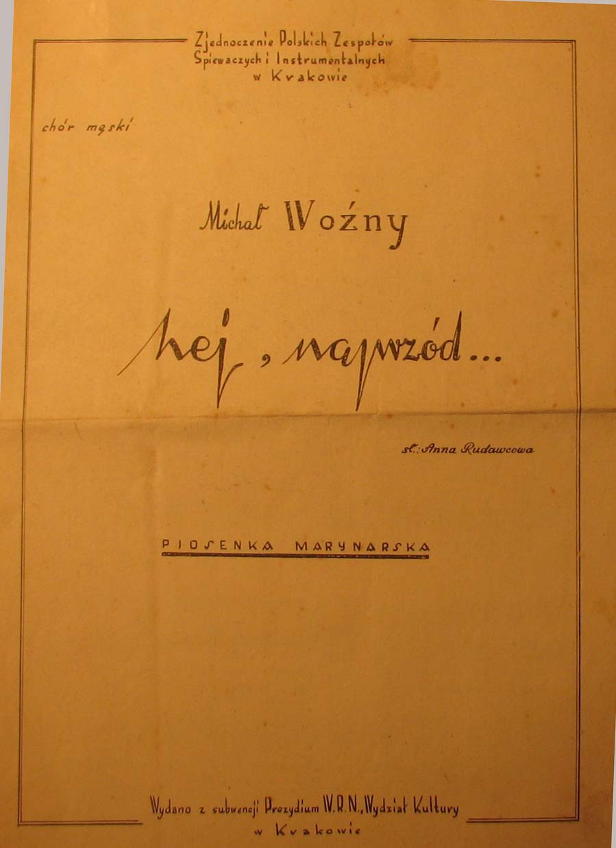 muz. Michał Woźny, sł. Anna Rudawcowa – Hej, naprzód... Piosenka Marynarska – nakł. Zjednoczenia Polskich Zespołów Śpiewaczych i Instrumentalnych w Krakowie, wyd. przedwojenne.